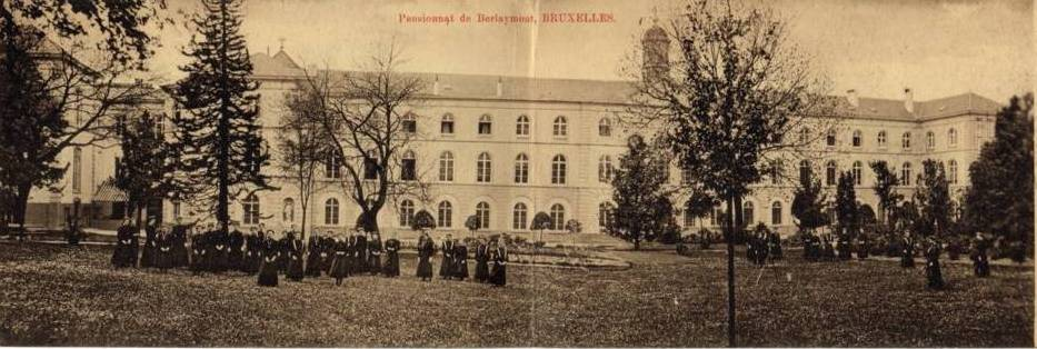 Pensionnat du Berlaimont à Bruxelles centre début 20ème siècle. Vue de la facade côté jardin.